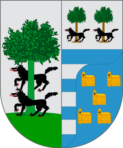 Zuzenketa bat egin diot zegoen armarriari.